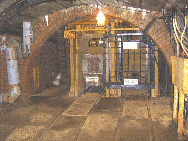 Ansicht eines Füllortes der Grube Hühn.